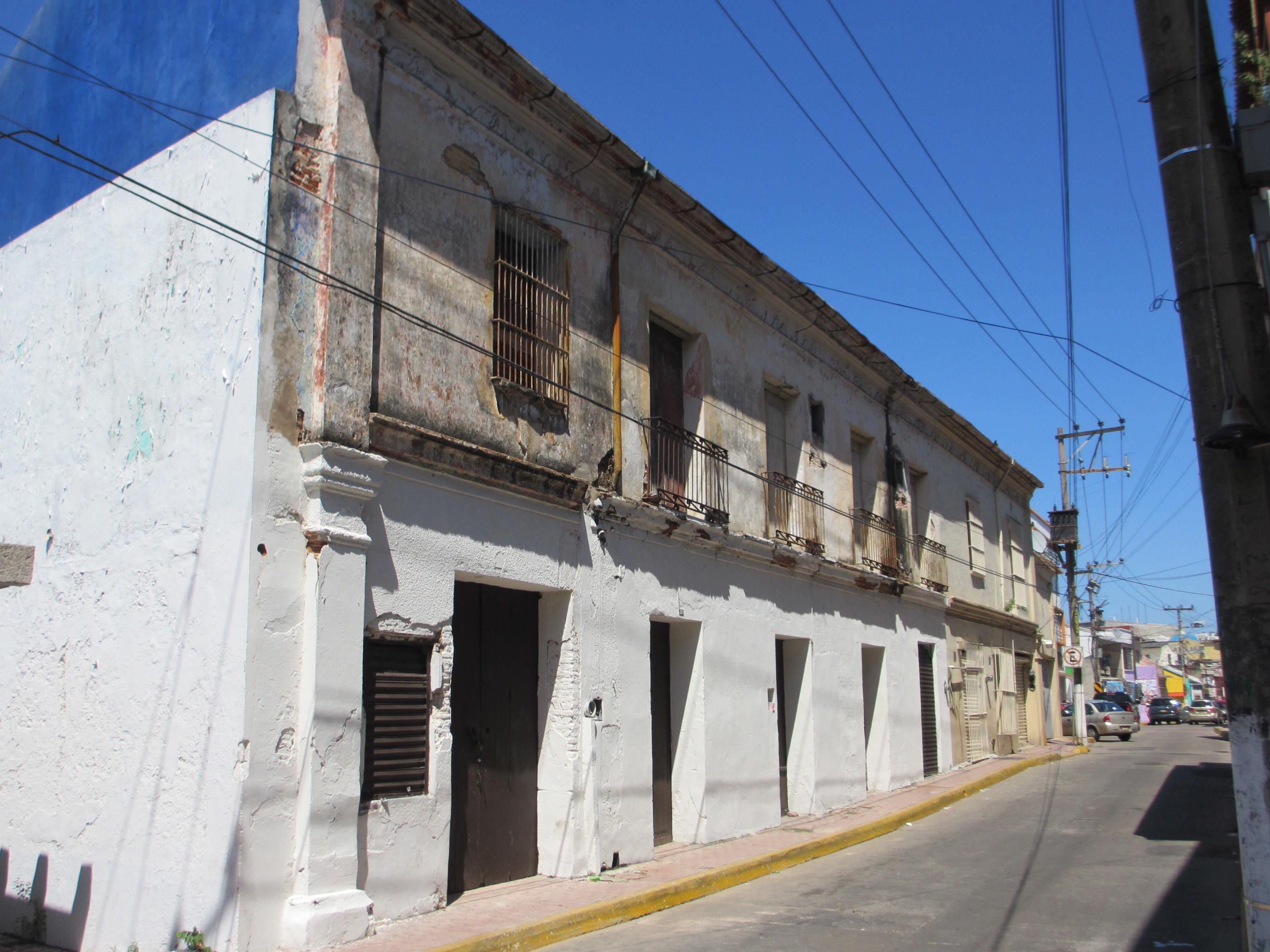 Según historiadores, este es el edificio más antiguo que queda en la ciudad, ya que después de los estudios realizados en sus muros y acabados, se sabe que su construcción data de 1750, y al estar ubicado detrás de la loma de la "Encarnación" (hoy calle 5 de Mayo), se salvó de los ataques pirátas, así como de los bombardeos norteamericanos (1846-1847) y franceses (1863-1864). El edificio está ubicado en la calle Miguel Hidalgo casi esquina con 27 de Febrero, en el centro histórico de la ciudad de Villahermosa, Tabasco, México.